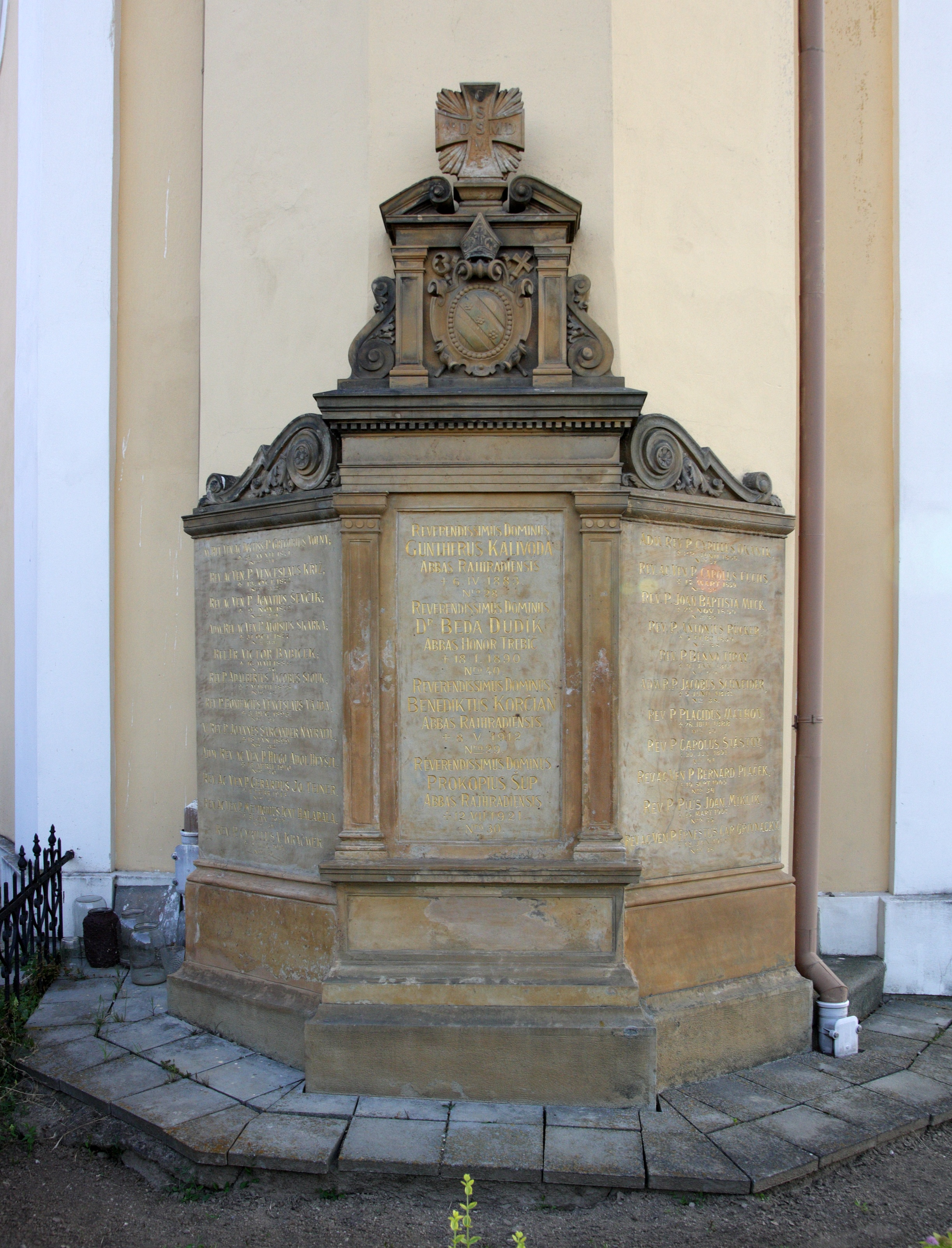 Rajhrad - kostel Povýšení svatého Kříže. Pomník zemřelým rajhradickým opatům.